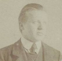 Portreto de Kazimierz Tymiński